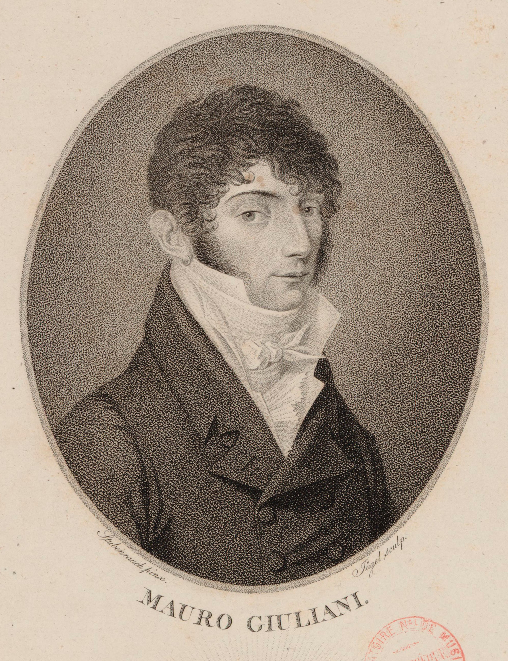 Depicted person: Mauro Giuliani